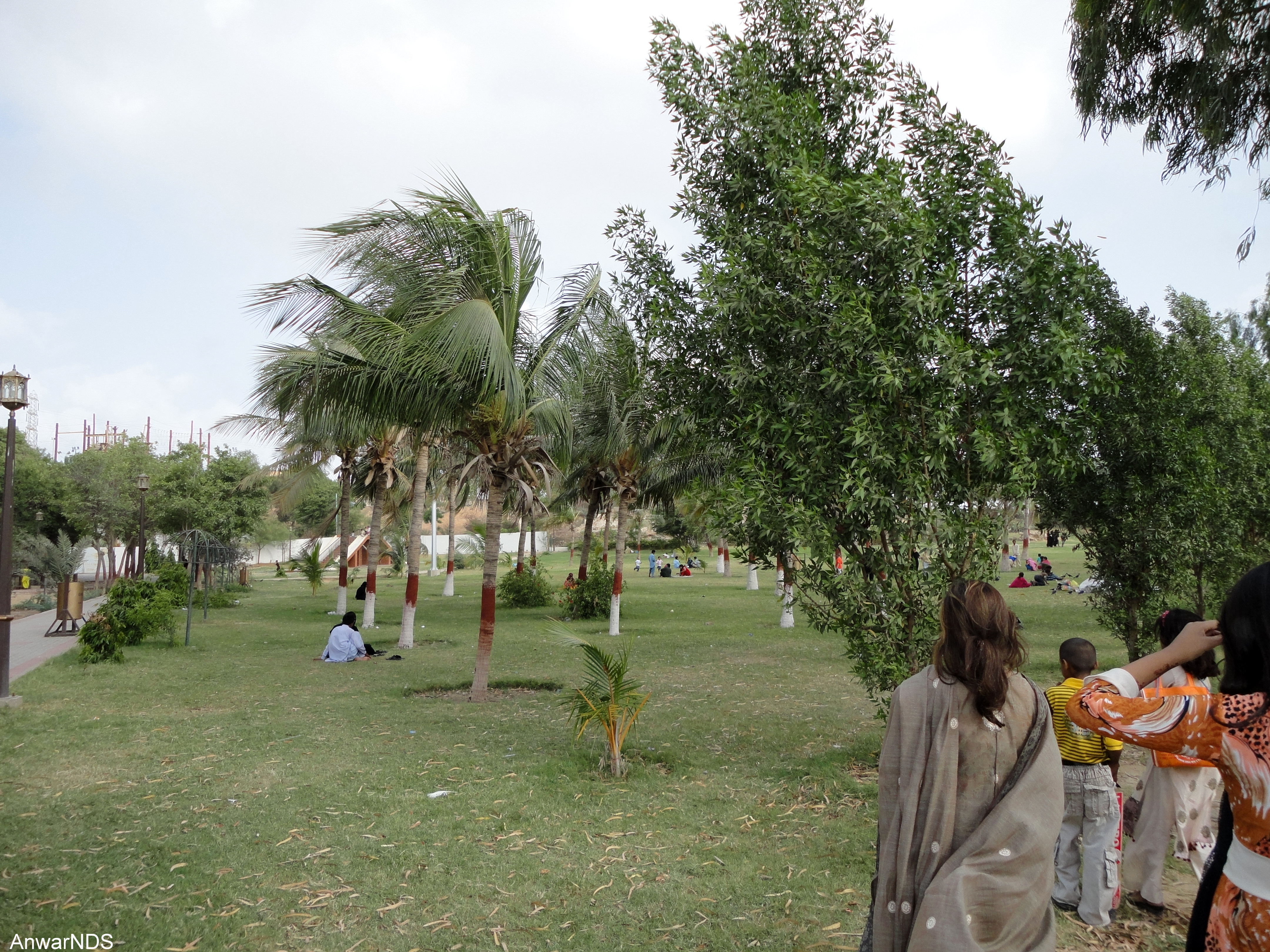 Safari Park Karachi